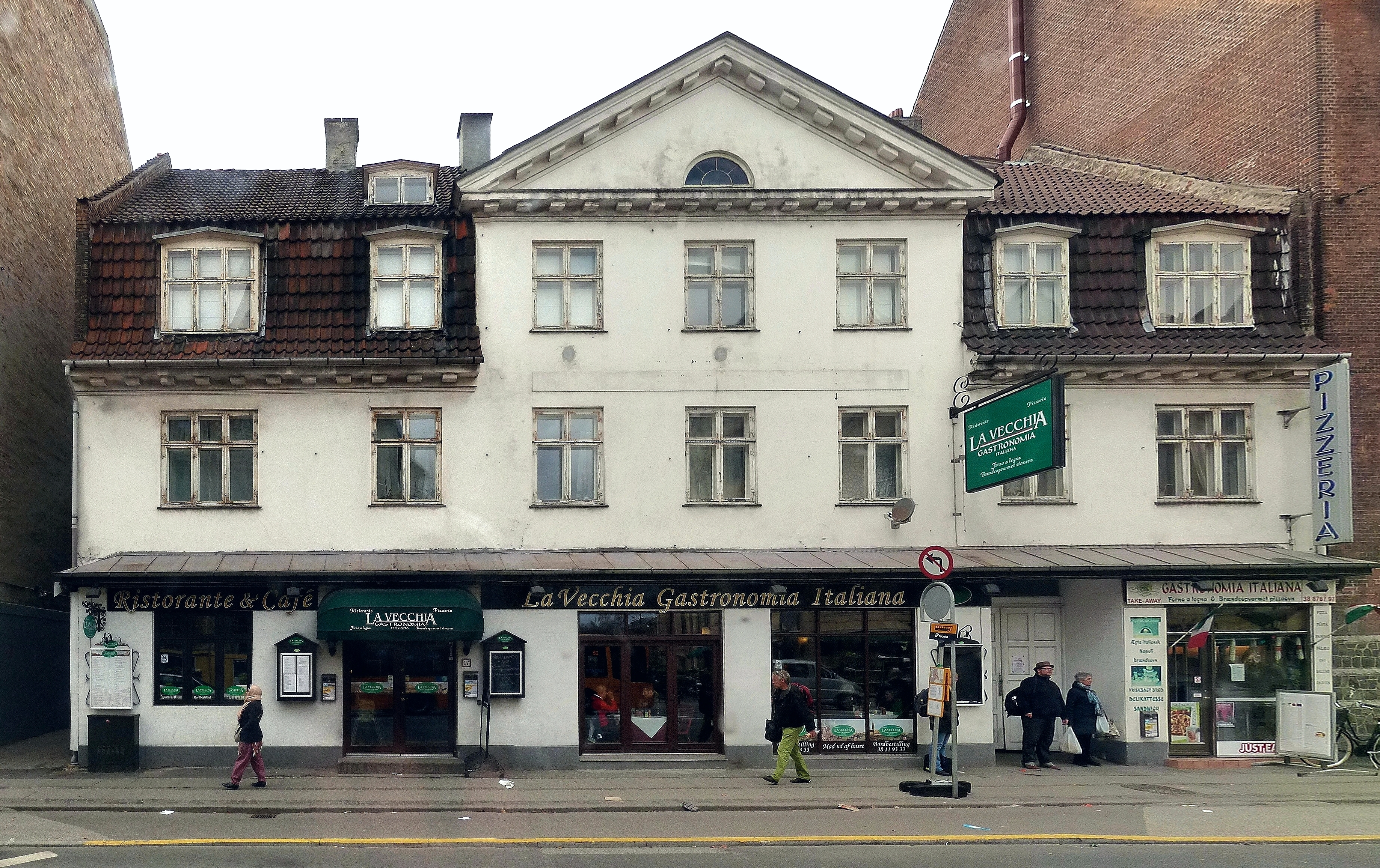 17 Falkoner Allé in Frederiksberg, Copenhagen, Denmark